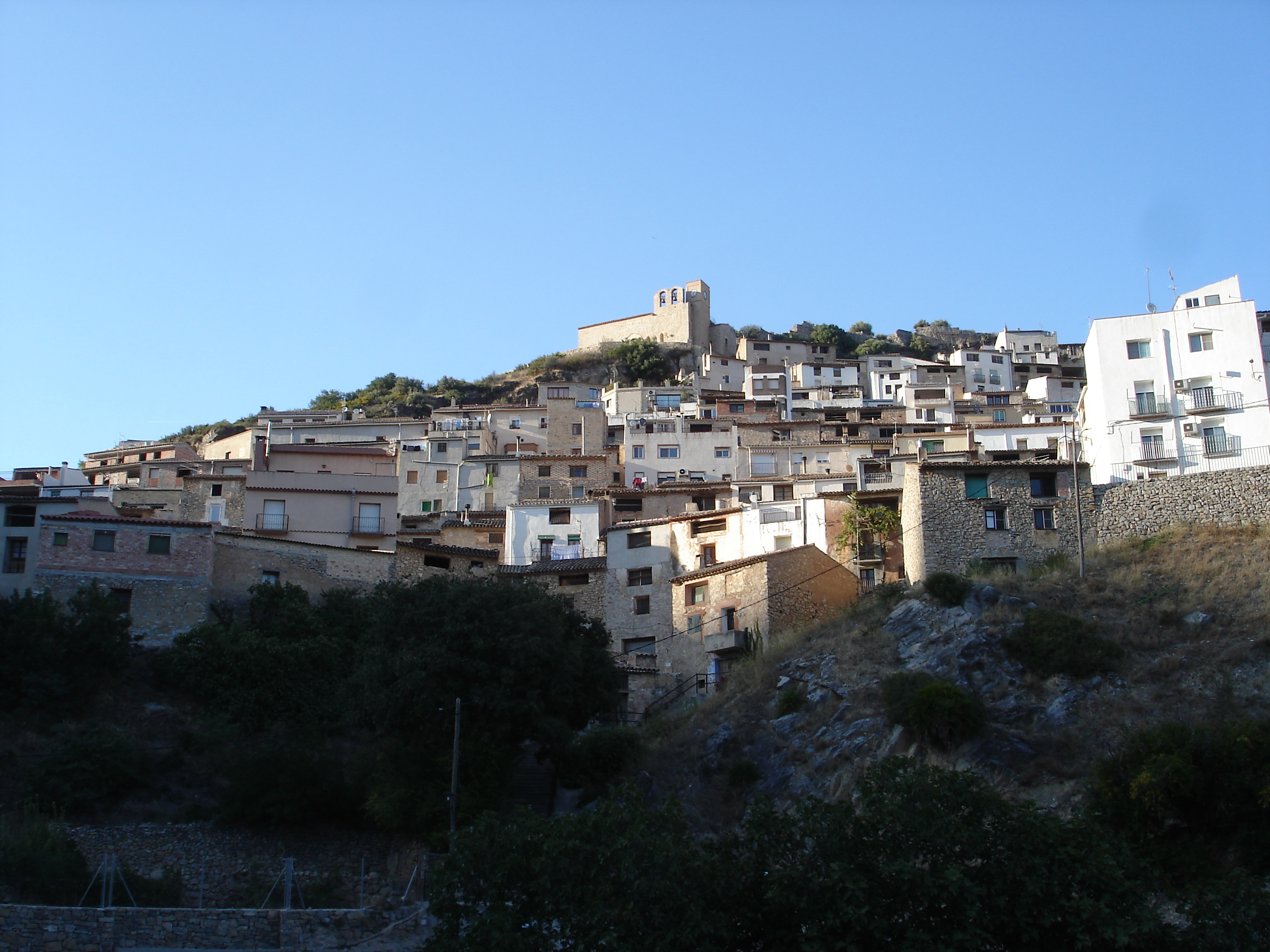 Vue générale de la ville de Paüls située en Catalogne (Espagne), dans la comarque de Baix Ebre (province de Tarragone).